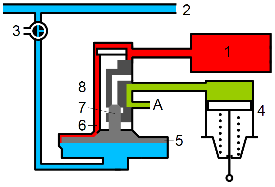 Steuerventil einer einlösigen Druckluftbremse: Lösen 1 Hilfsluftbehälter 2 Hauptluftleitung 3 Ausschalthahn 4 Bremszylinder 5 Steuerkolben 6 Füllnut 7 Abstufungsventil 8 Schieber A Luftauslass ins Freie